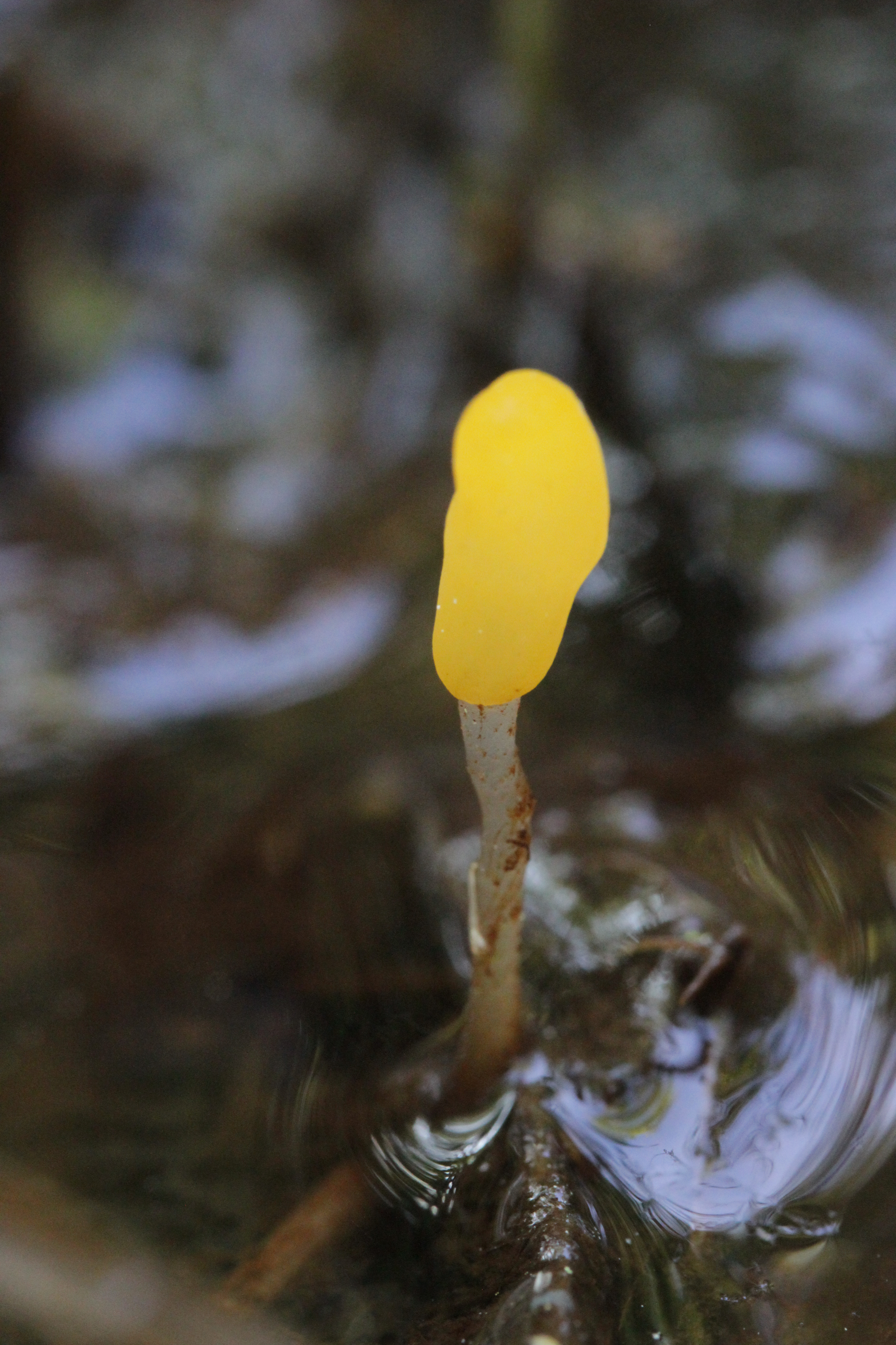 Bog Beacon - Mitrula paludosa